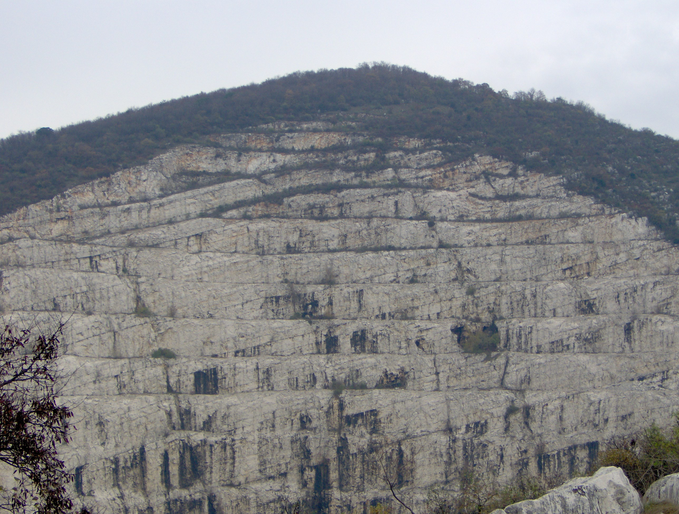 Ex cava Burgazzi - Rezzato